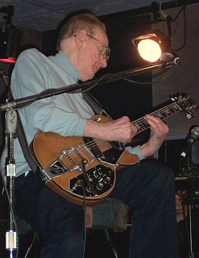 Lester William Polfus (Les Paul)